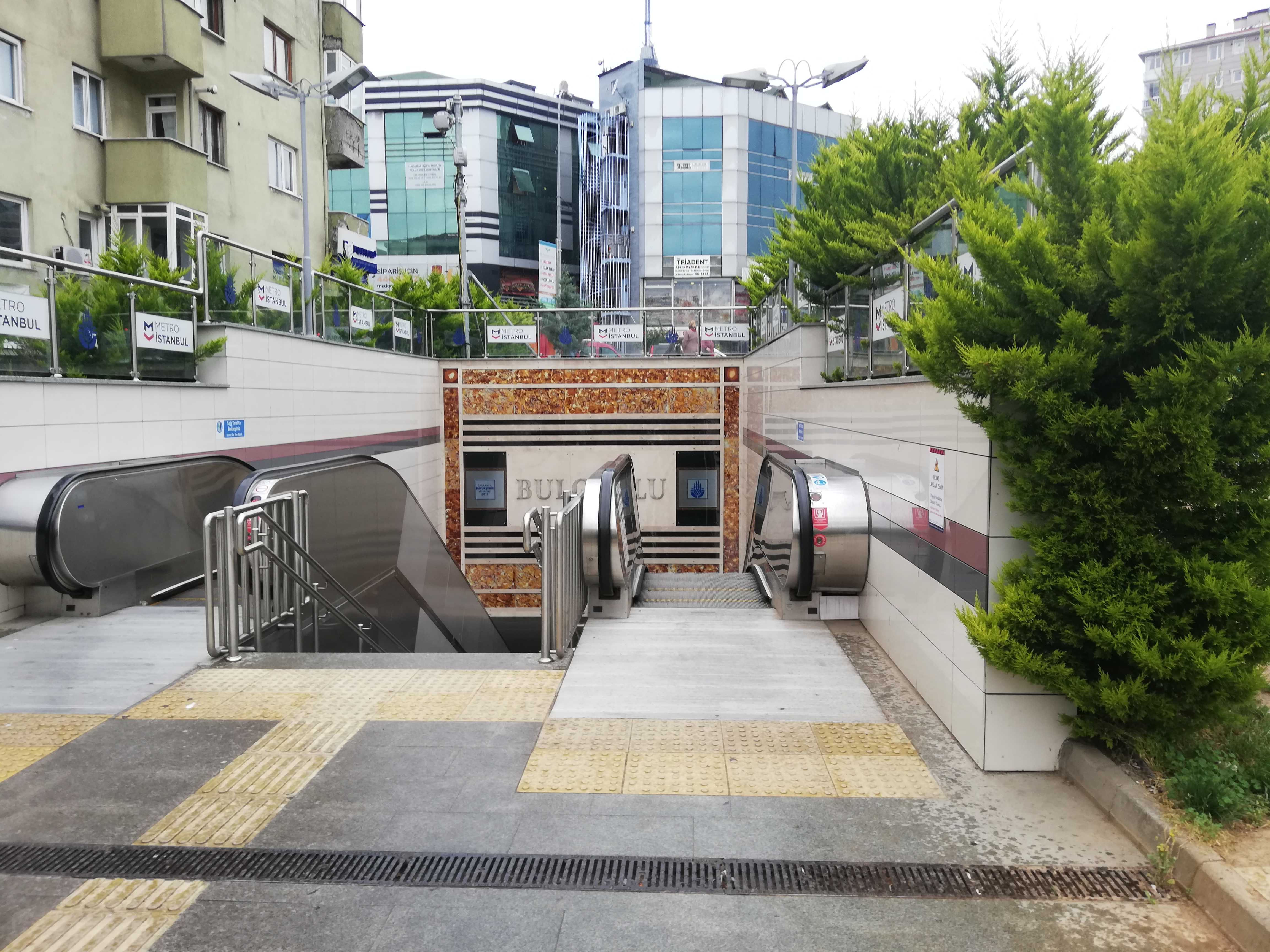 bulgurlu istasyonu 1. giriş